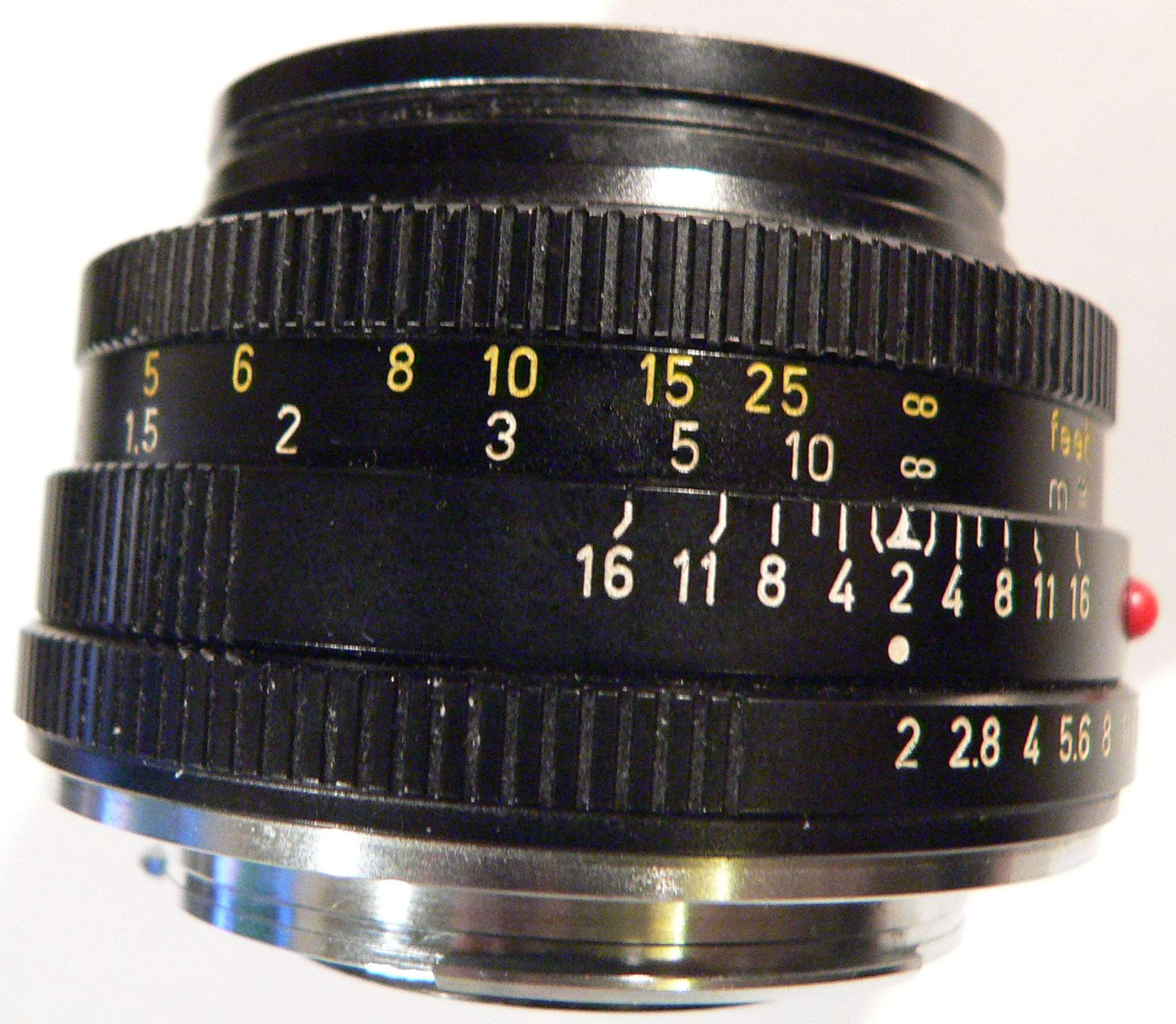 Summicron-R 50mm f/2